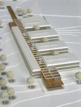 Modell des 1. Preisträgers des Architektenwettbewerbs, Architekten Fritsch & Tschaidse